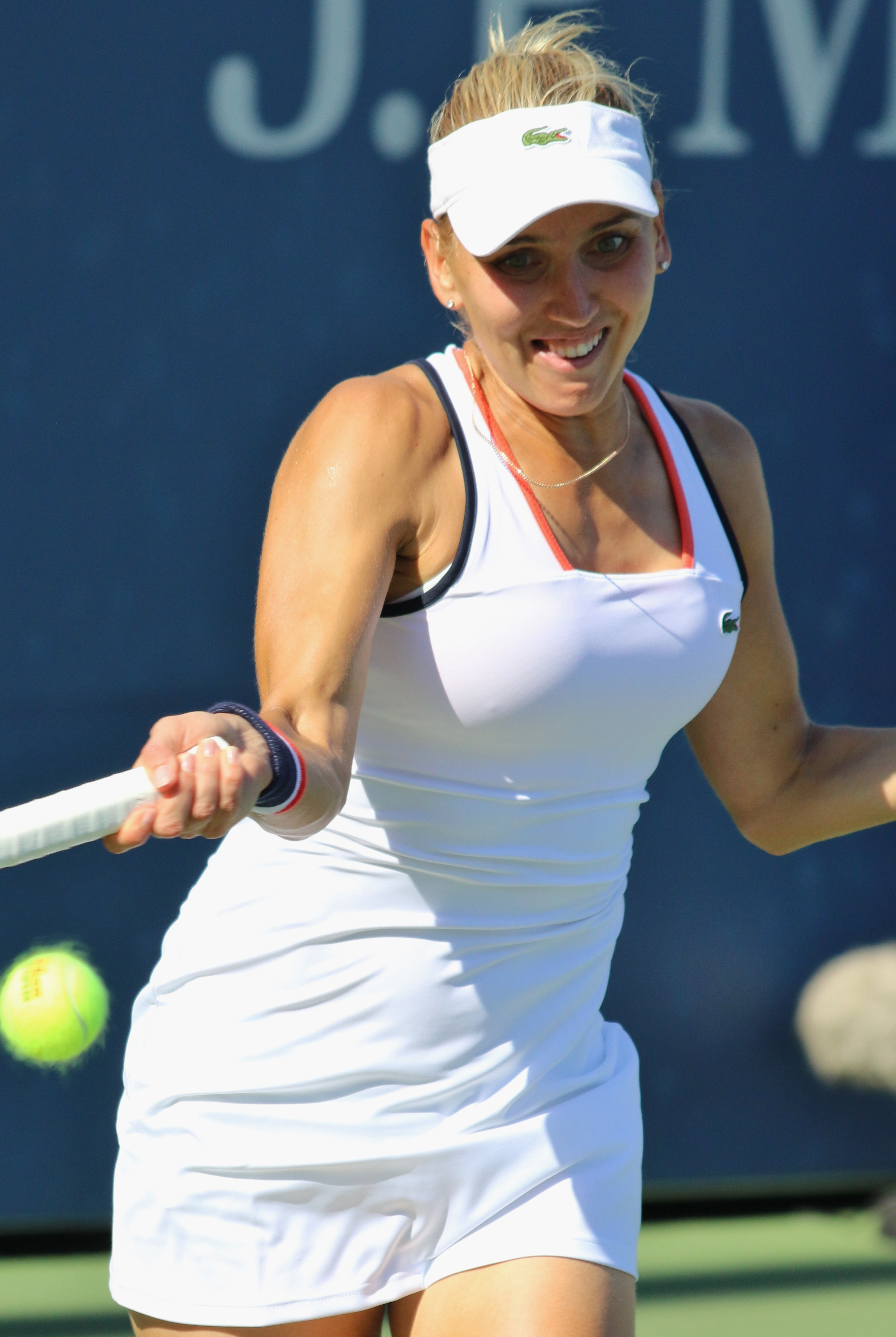 Vesnina US16 (10)